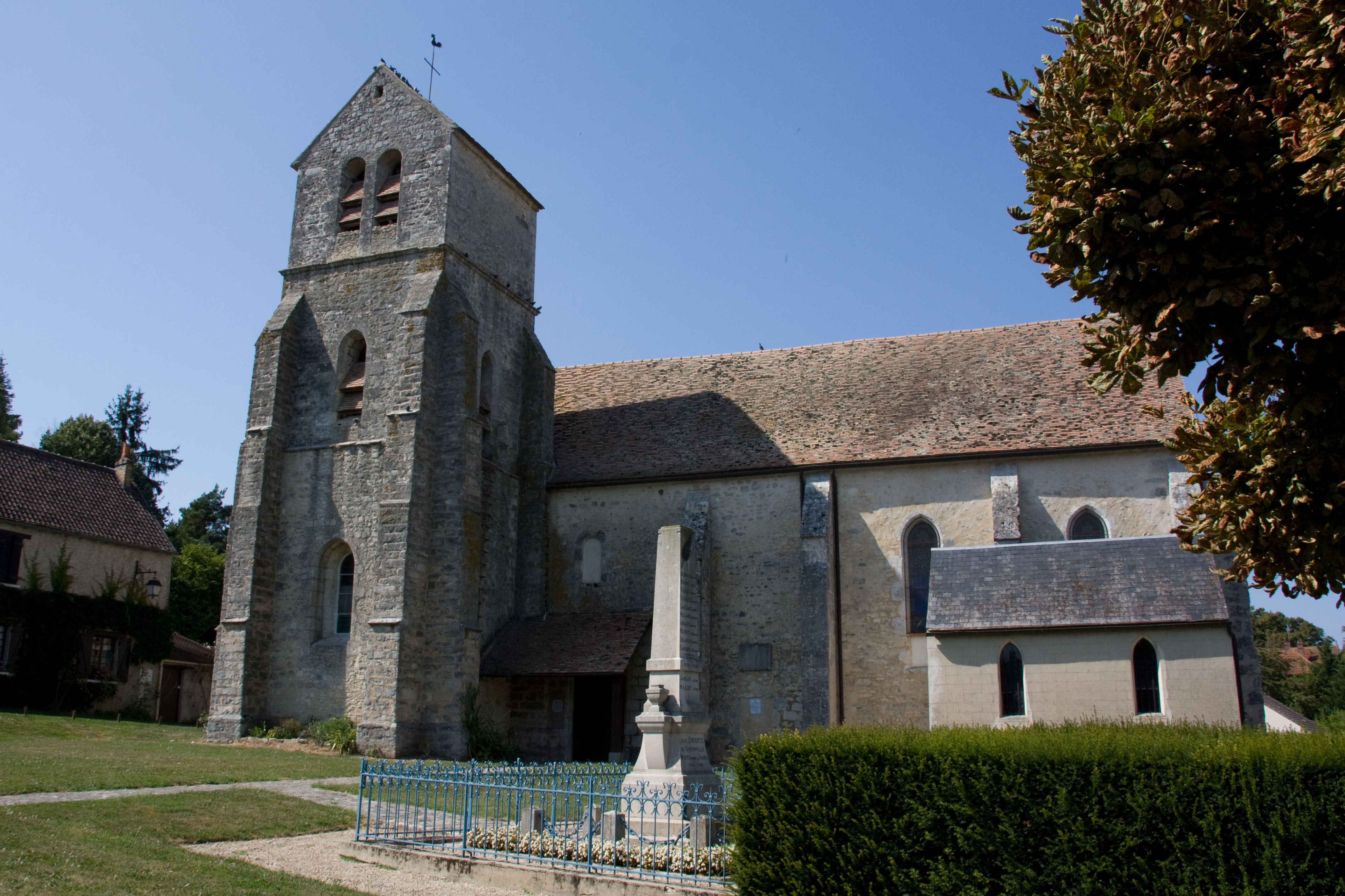 Eglise de Gironville-sur-Essonne, Gironville-sur-Essonne, Essonne, France